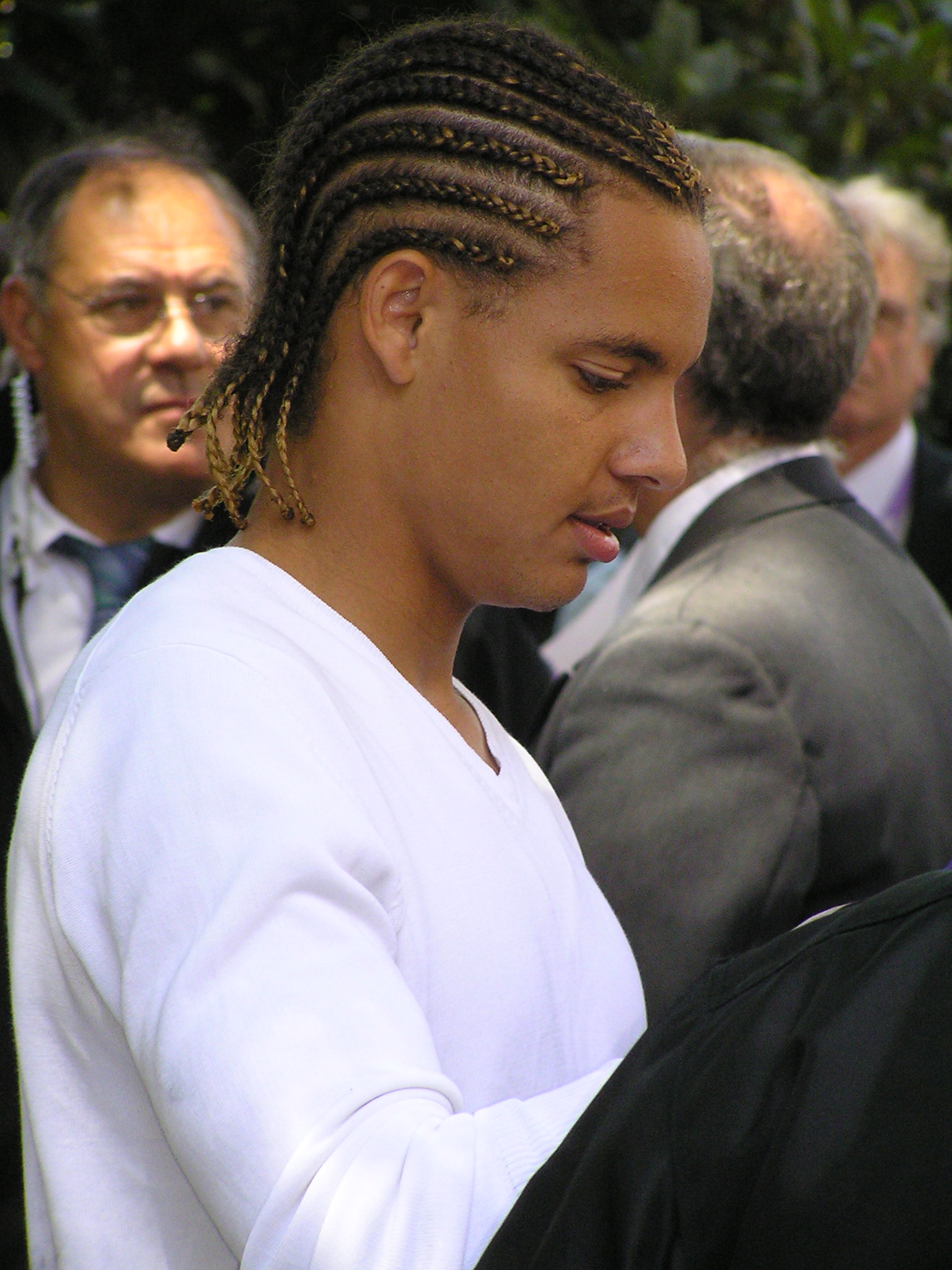 Daniel Congré (joueur du TFC, internationnal espoir français)